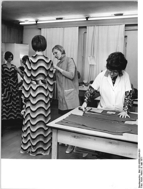 Zentralbild-Koch 8.5.1971 Leipzig: 25 Jahre Verlag für die Frau-In der Modellanfertigung des Verlages entstehen jährlich ca. 800 Modelle. Die Schneiderinnen Renate Bletry und Meisterin Karin Wiedemann (v.l.n.r.) sind wesentlich am Entstehen der Kollektion beteiligt. Internationale Anerkennung finden auch die Zeitschriften, Bücher und Schnittmuster des Verlages, der 1971 auf ein 25-jähriges Bestehen zurückblicken kann. Seine Erzeugnisse werden in 40 Länder exportiert. Bitte beachten Sie auch das Motiv K0508-03-1N